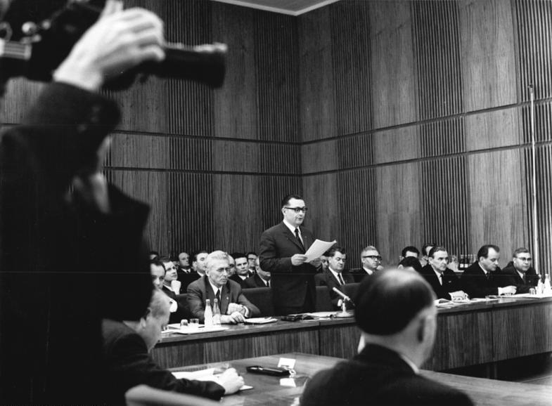 Zentralbild/Brüggmann 16.4.1970 Berlin: 24. Sitzung des Staatsrates der DDR - Wissenschaftsorganisation der Chemie und sozialistische Kommunalpolitik auf der Tagesordnung. Weitreichende Beschlüsse für die Gestaltung des entwickelten sozialistischen Gesellschaftssystems mit dem Ökonimischen System als Kernstück fasste der Staatsrat der DDR am 16.4.70 auf seiner 24. Sitzung unter Vorsitz von Walter Ulbricht, in Berlin. Zum Punkt zwei der Tagesordnung lag der Beschlußentwurf über die sozialistische Kommunalpolitik zur Entscheidung vor. Dazu nahm das Gremium als erstes einen Bericht von Minister Fritz Scharfenstein entgegen. V.l.n.r.: Siegfried Böhm, Herbert Fechner, Fritz Scharfenstein (stehend), Günter Sieber, Wolfgang Rösser.